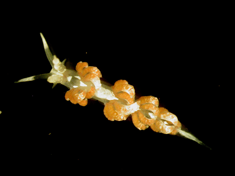 Favorinus japonicus, islaLizard, Australia